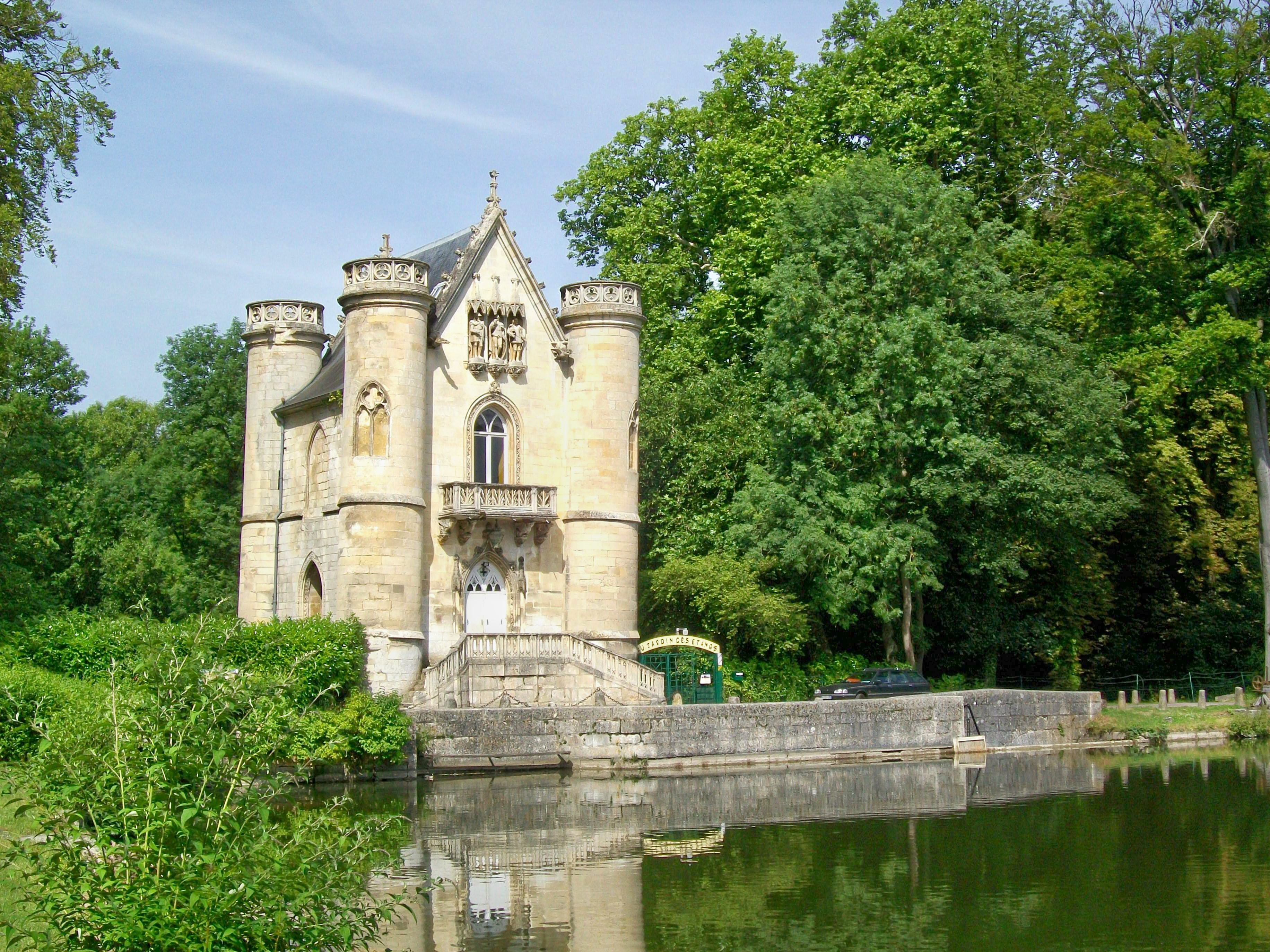 Le château de la Reine Blanche, en face de l'étang de la Loge (premier des étangs de Commelle), à Coye-la-Forêt (60).